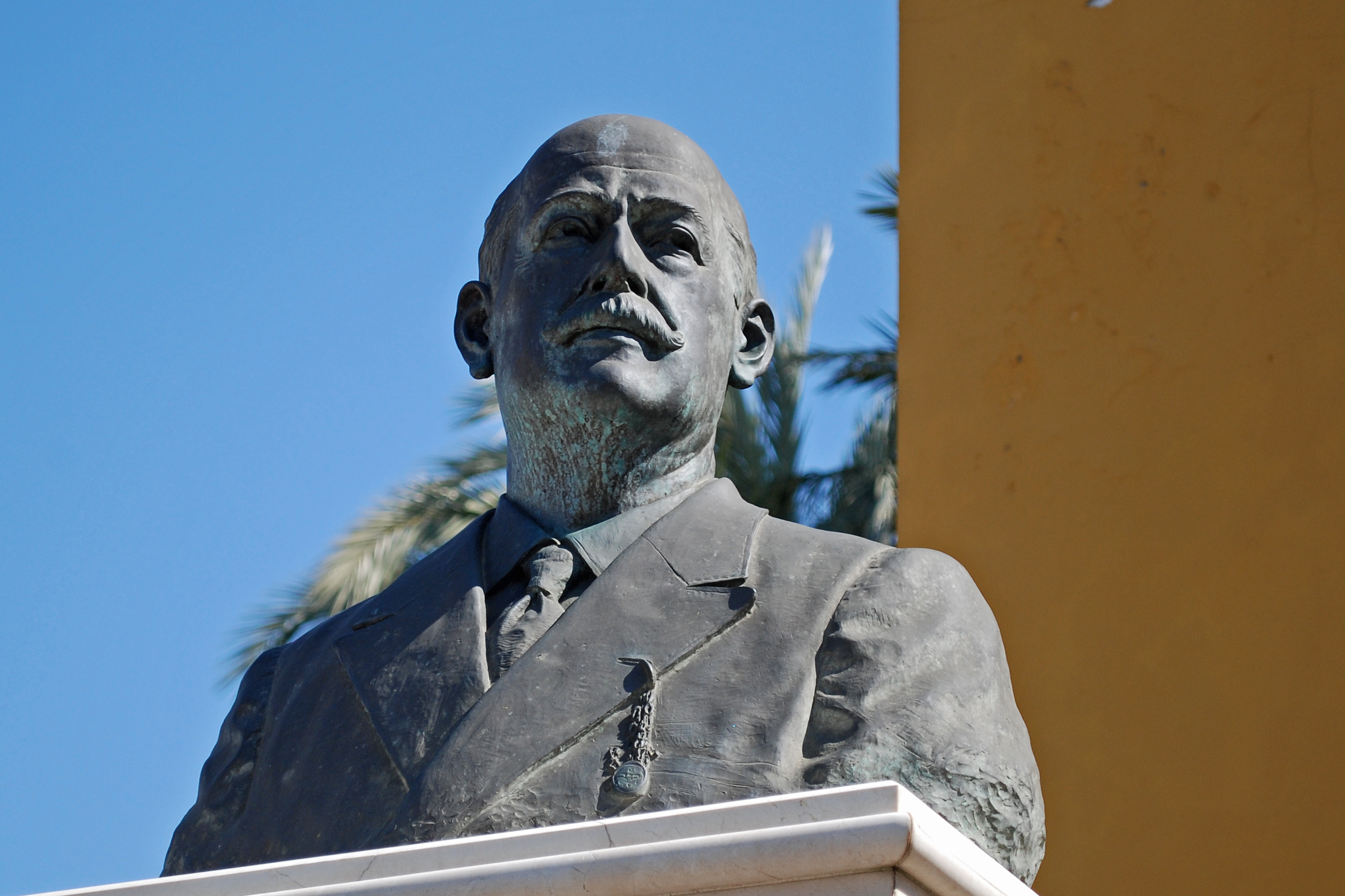 Busto en recuerdo del bordador Juan Manuel Rodríguez Ojeda, obra del escultor Luis Álvarez Duarte (Sevilla); a la derecha, la puerta de la Macarena.